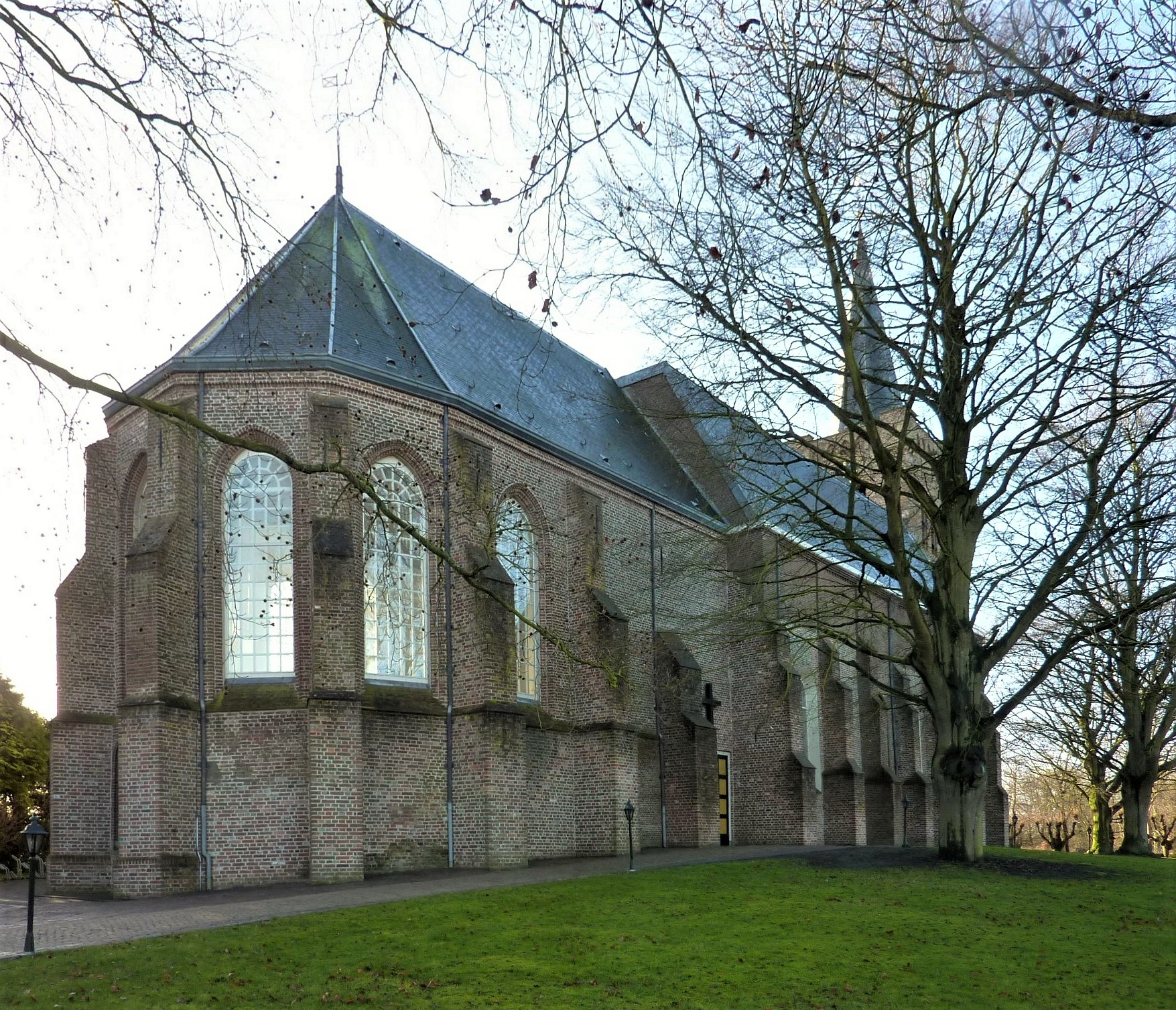 Sint Maartenskerk (Wemeldinge)